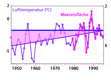 Temperatur und Packeisfläche (the scale for the ice is inverted to demonstrate the correlation - the horizontal line is the freezing point - the oblique line the average of the temperature - in 1995 the temperature reached the freezing point)